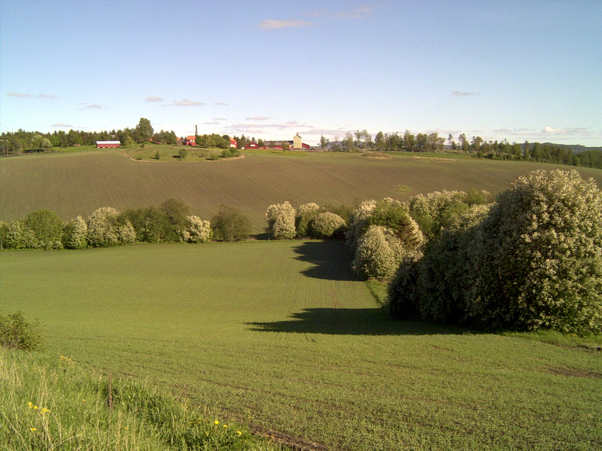 Inderøy, Nord-Trøndelag.